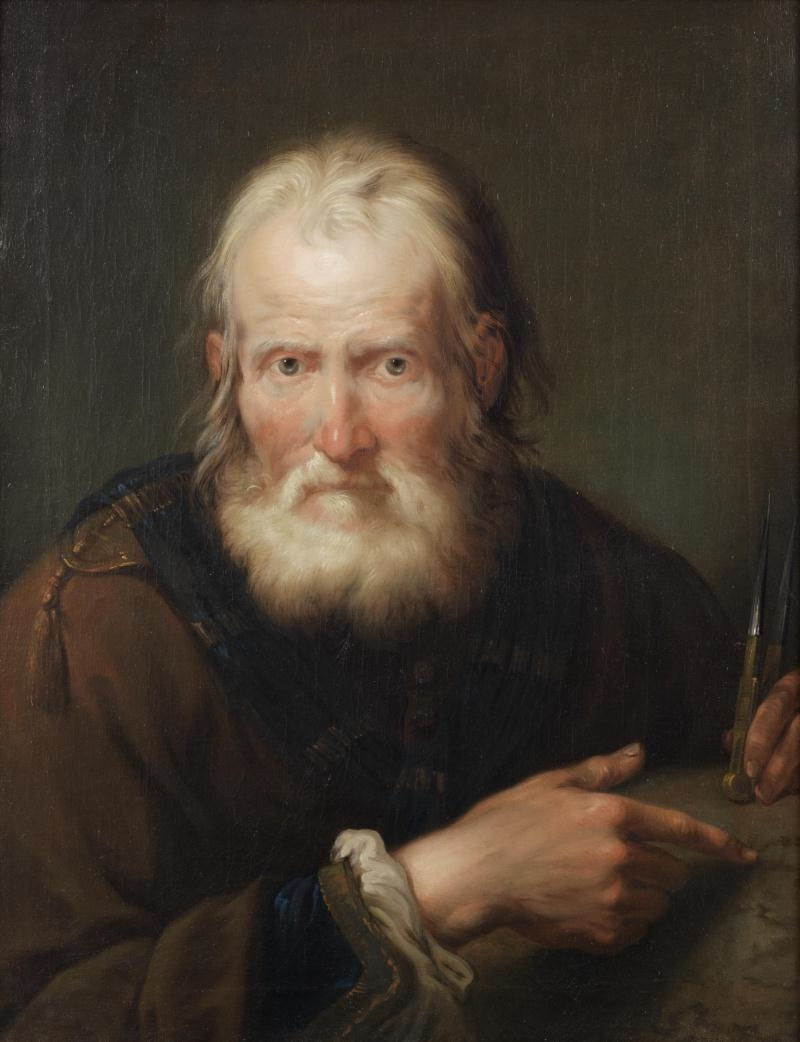 阿基米德畫像